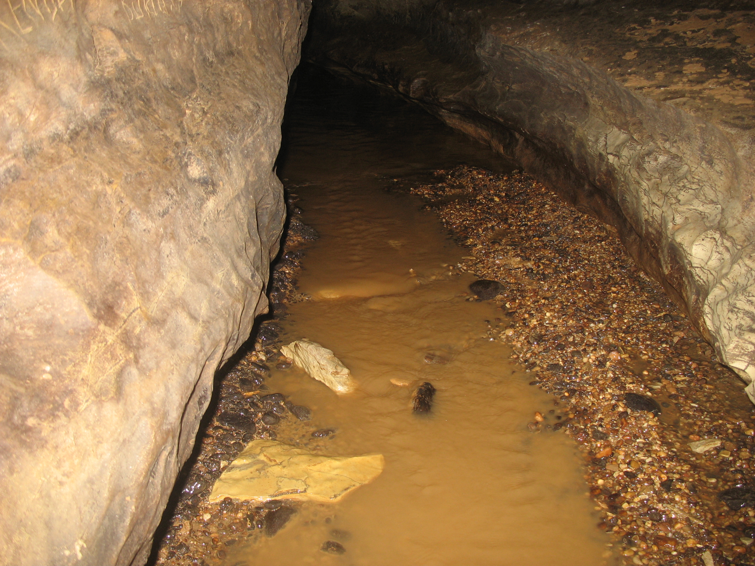 Saklıkaya Mağarası